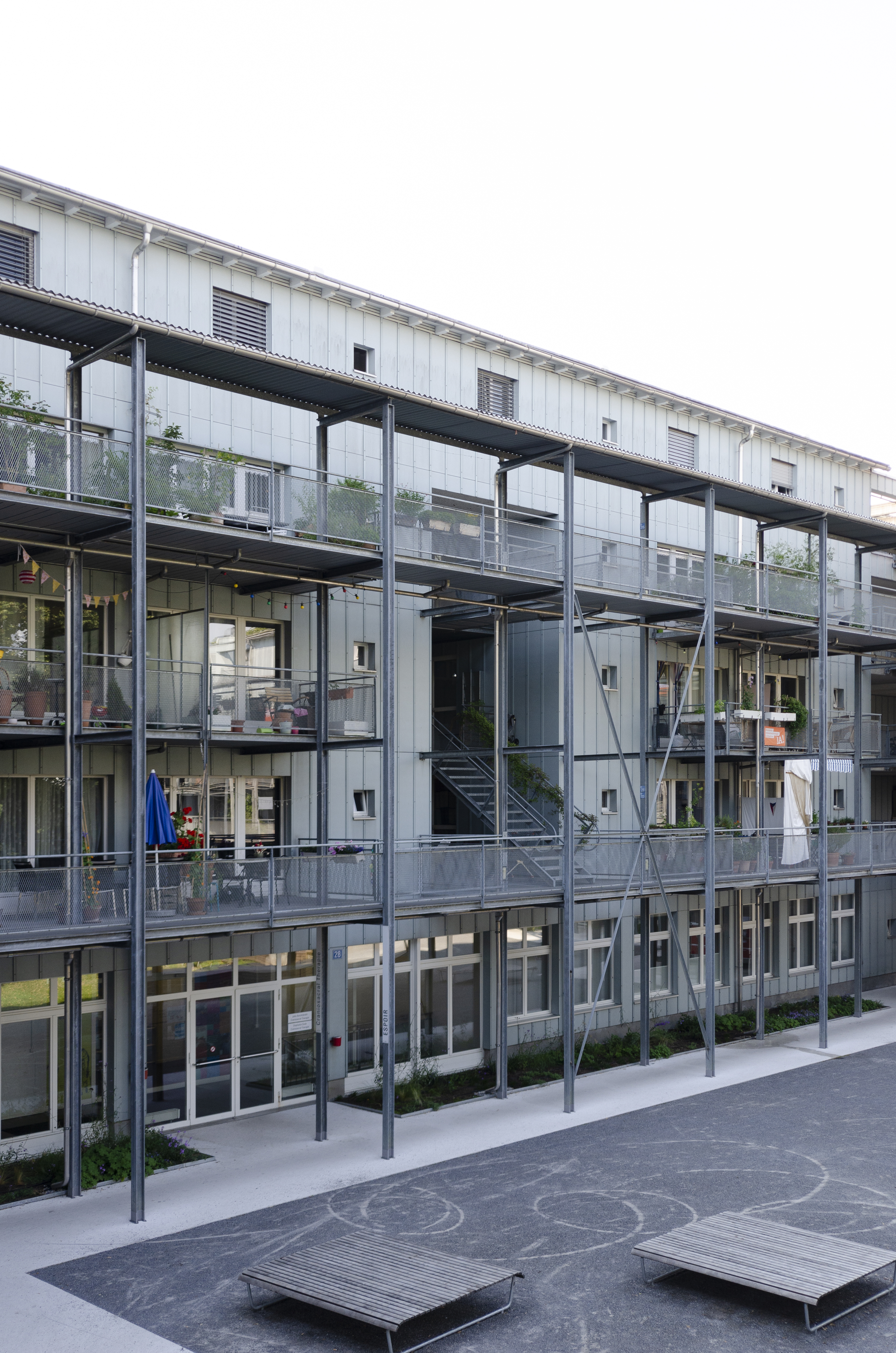 Siedlung Brahmshof, Kuhn Fischer Partner, erbaut 1987-1991